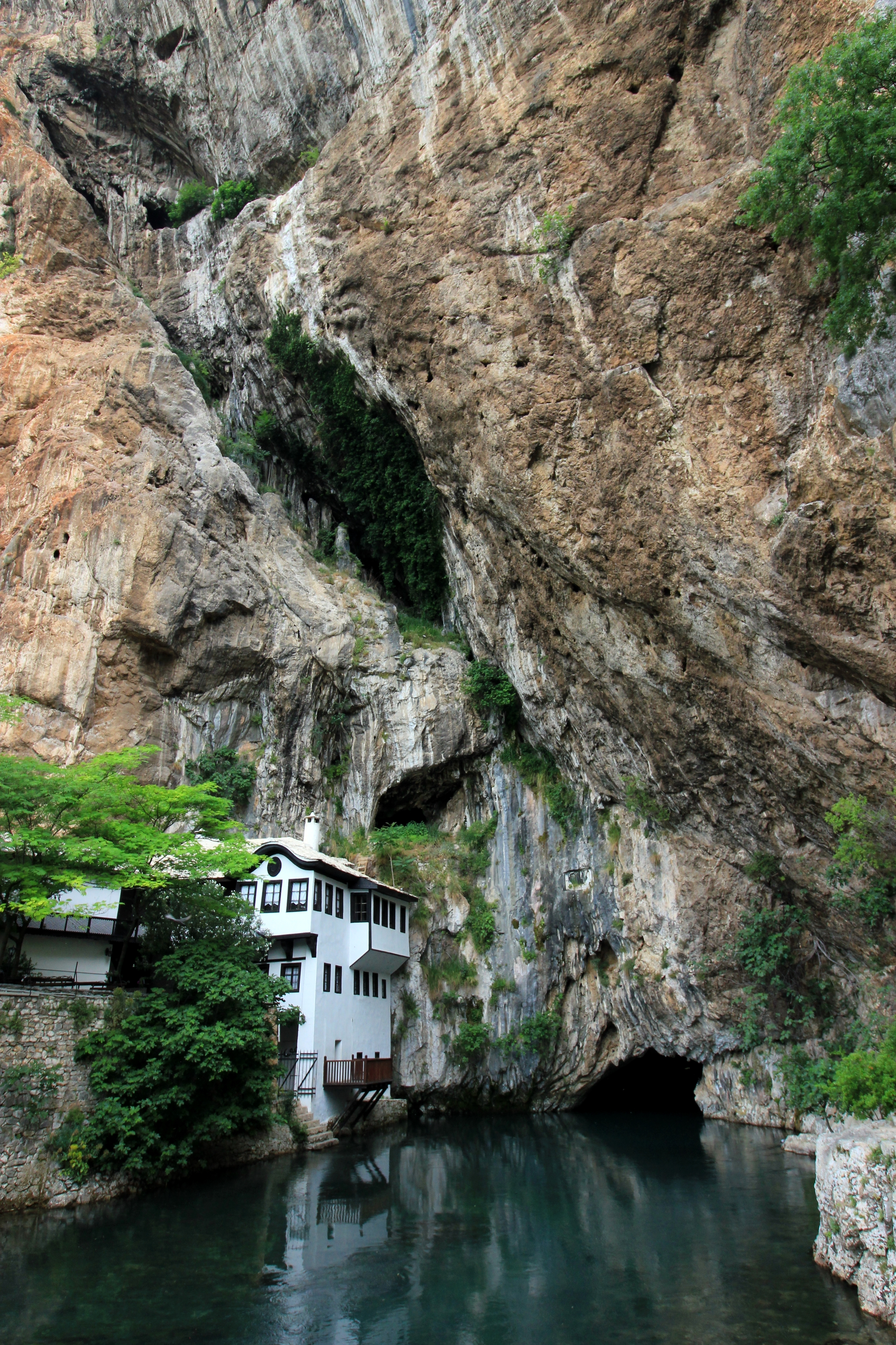 Quelle der Buna in Blagaj